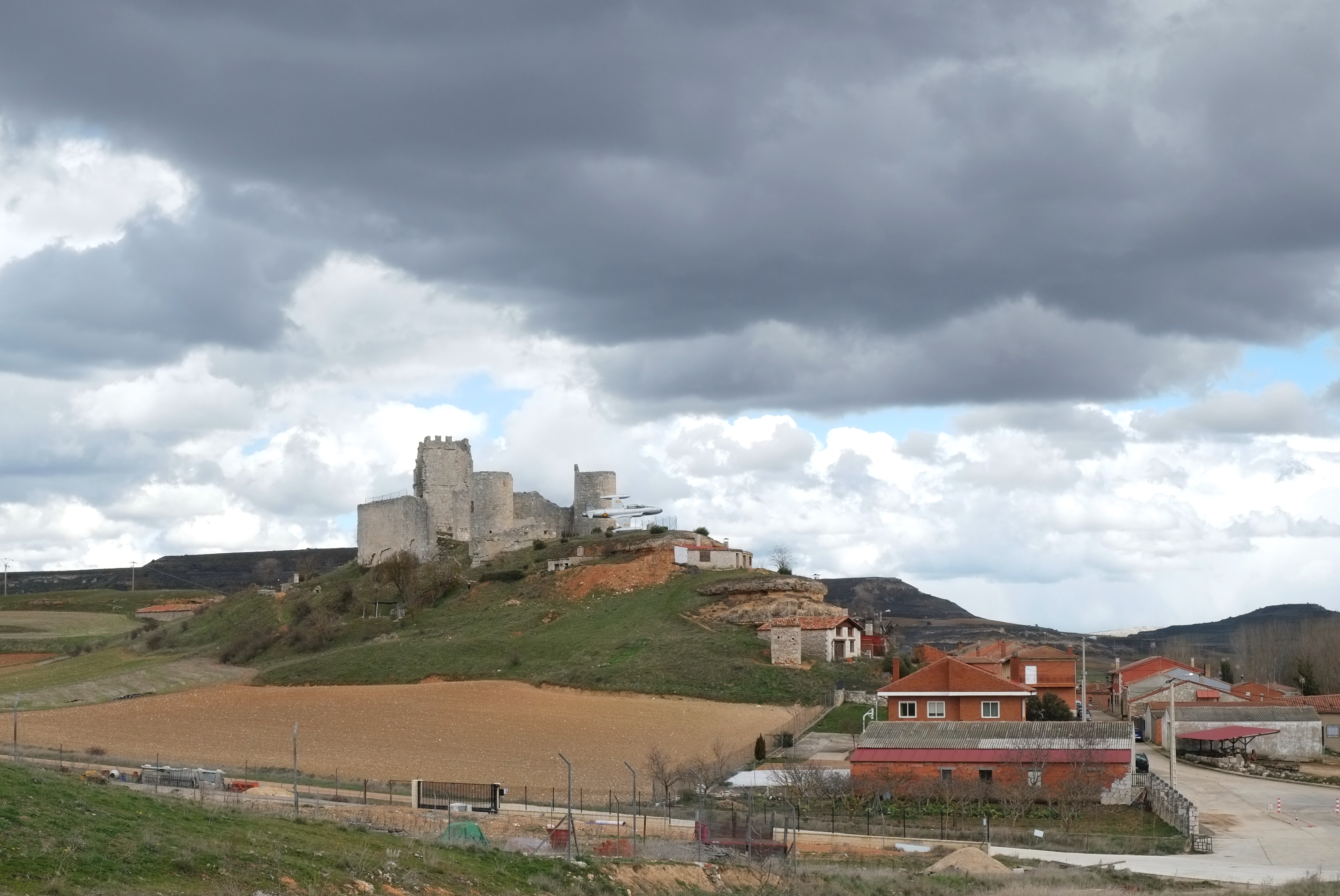 Burg in Calatañazor in der Provinz Burgos (Spanien)